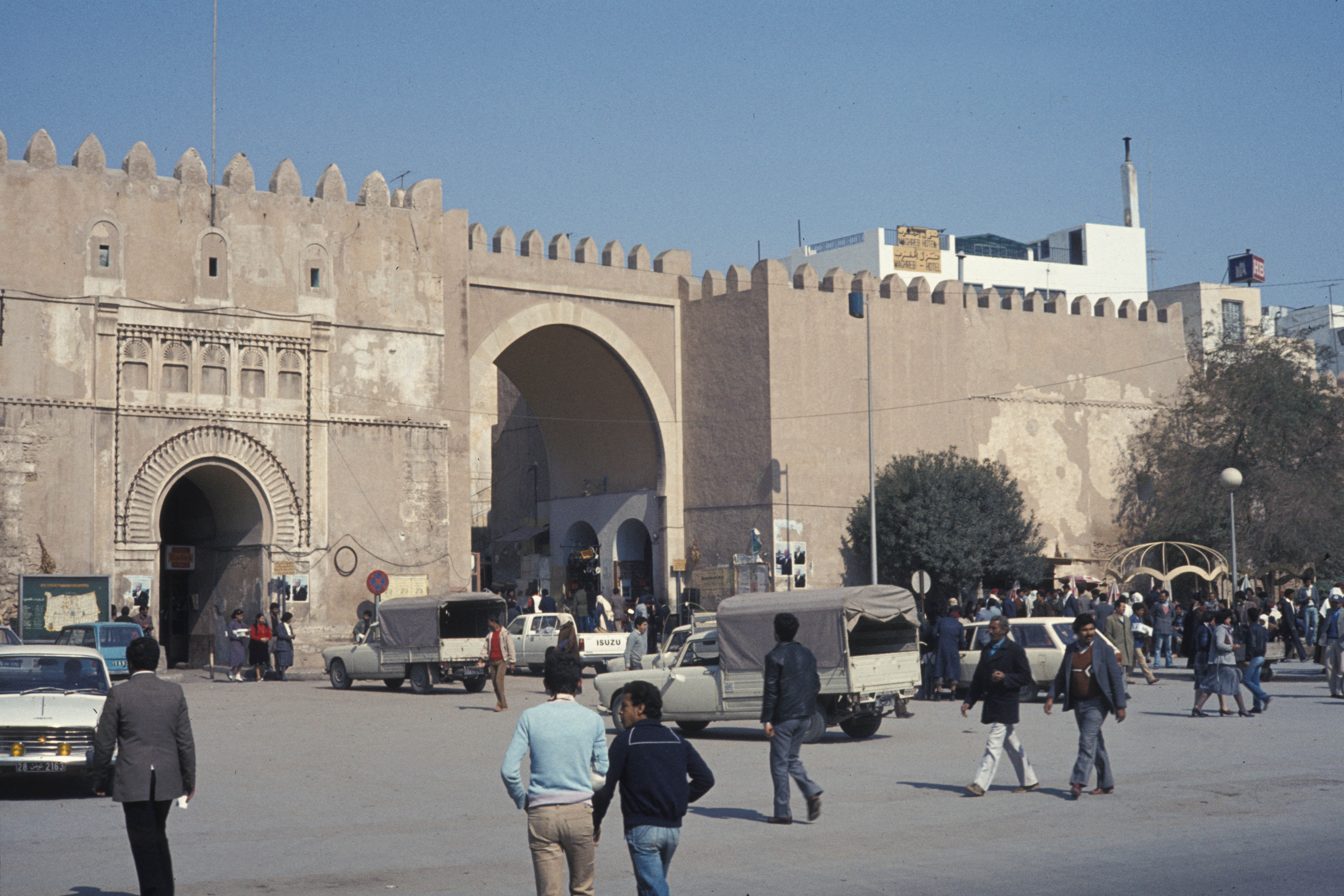 Tunisia